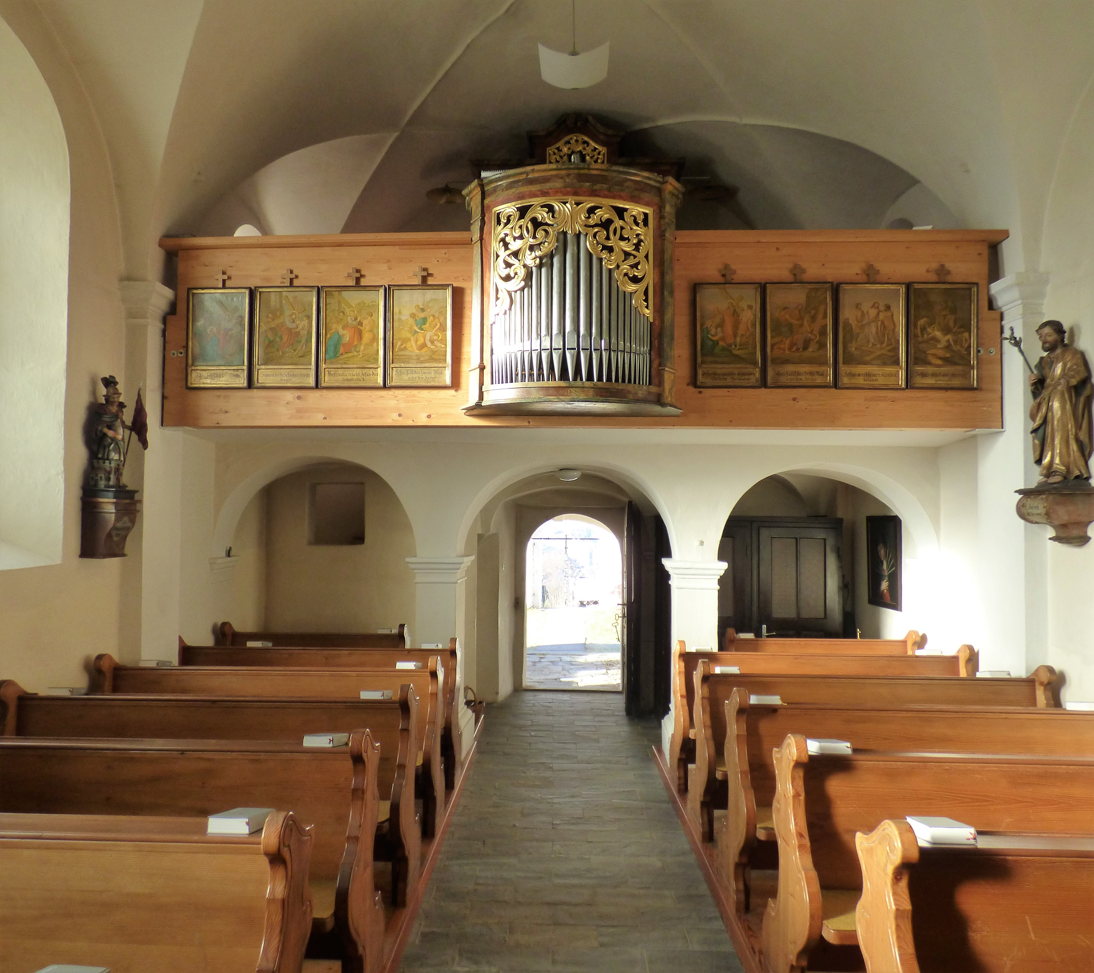 Kirche St. Ulrich (Gemeinde Feldkirchen, Kärnten): Empore, Orgel